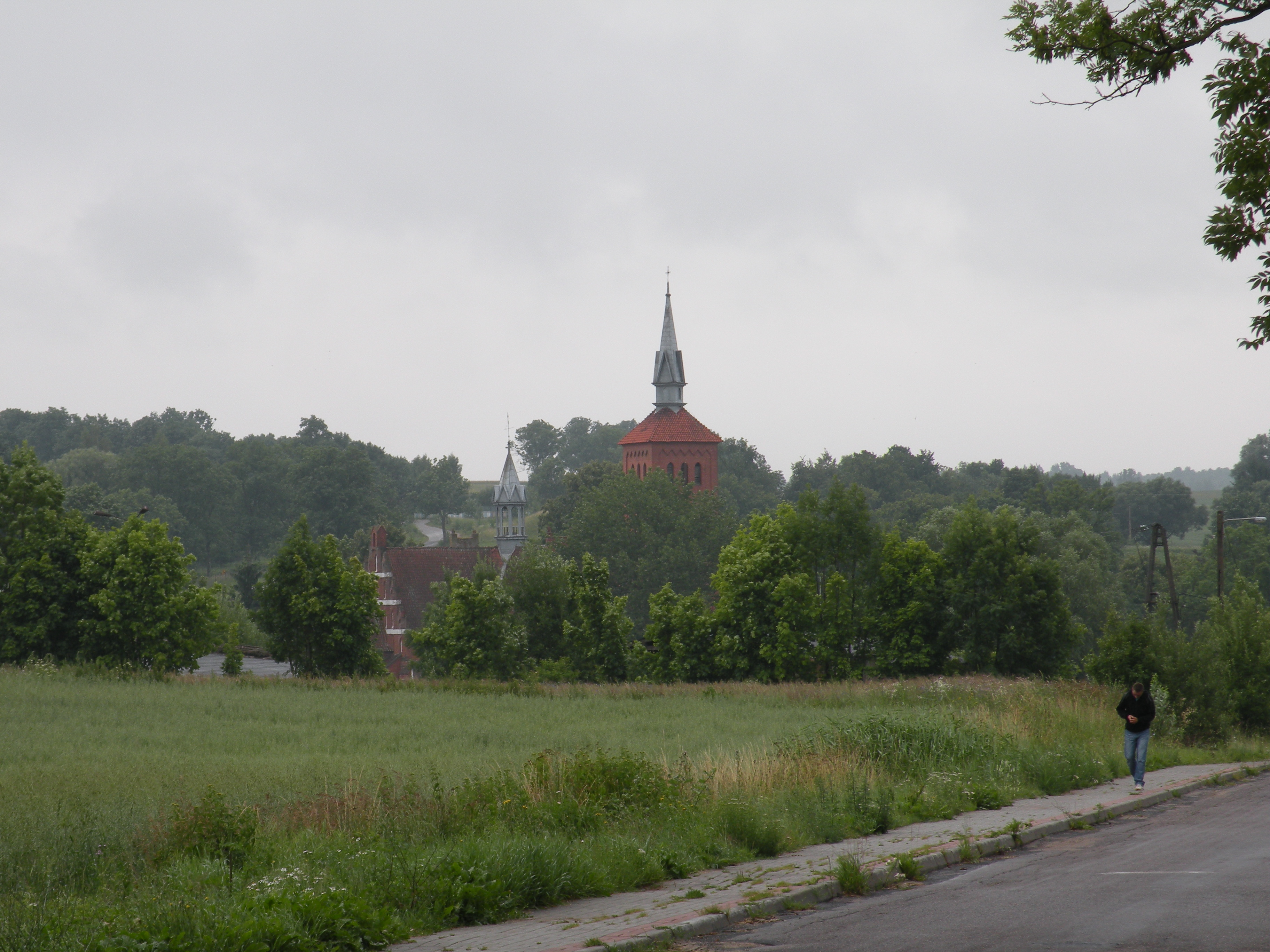 Kolno w województwie warmińsko-mazurskim